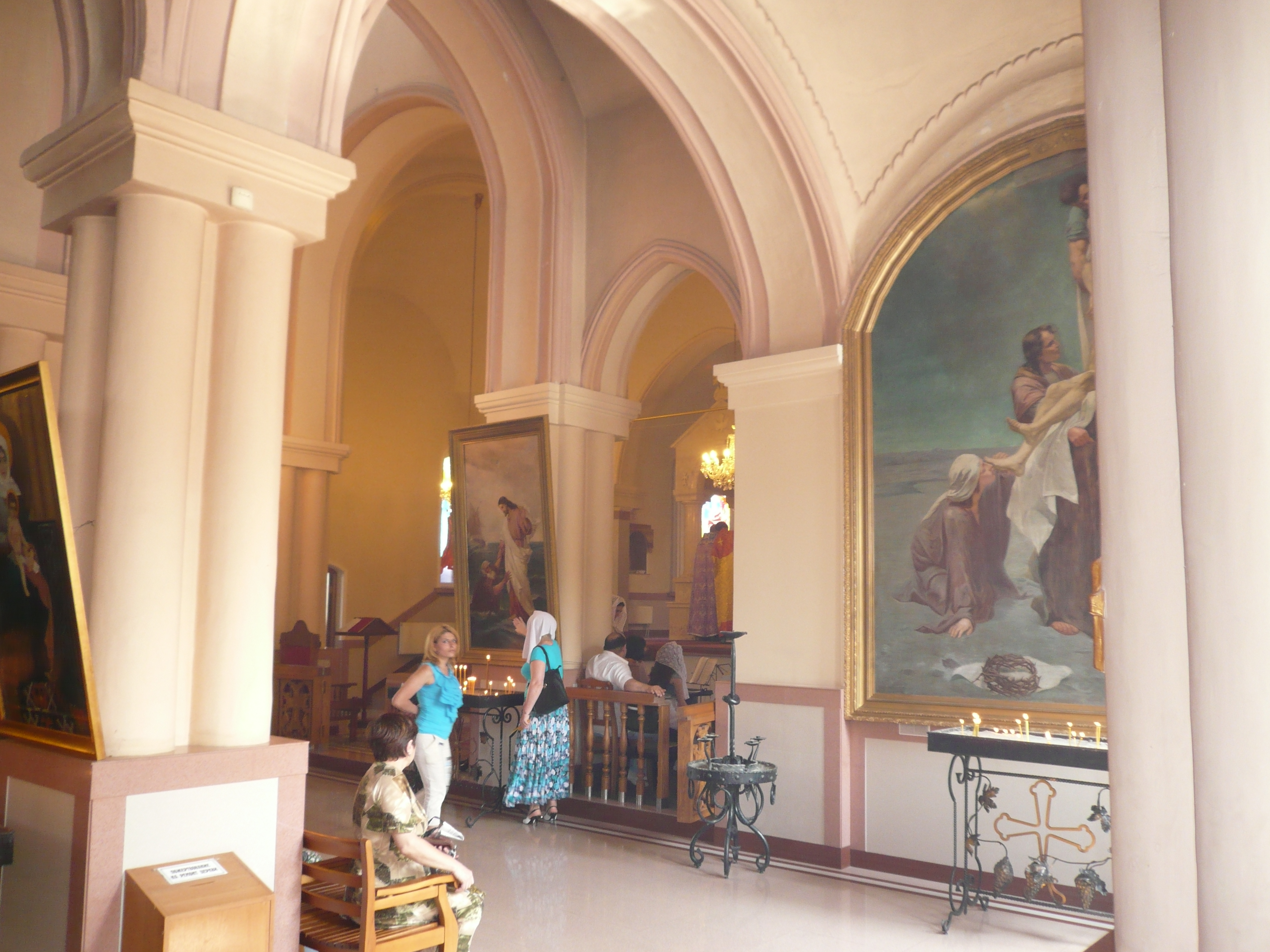 Армянская церковь во Владикавказе. Интерьер.